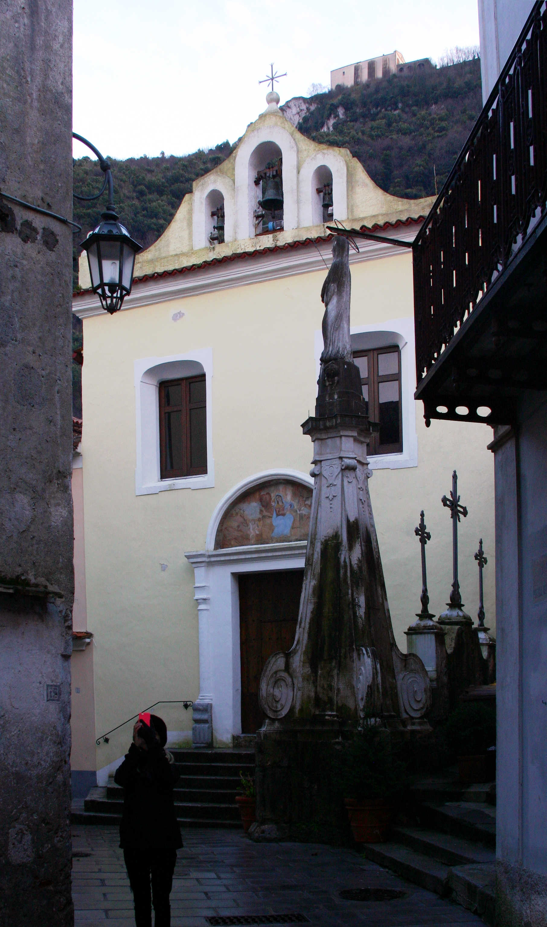 Maratea